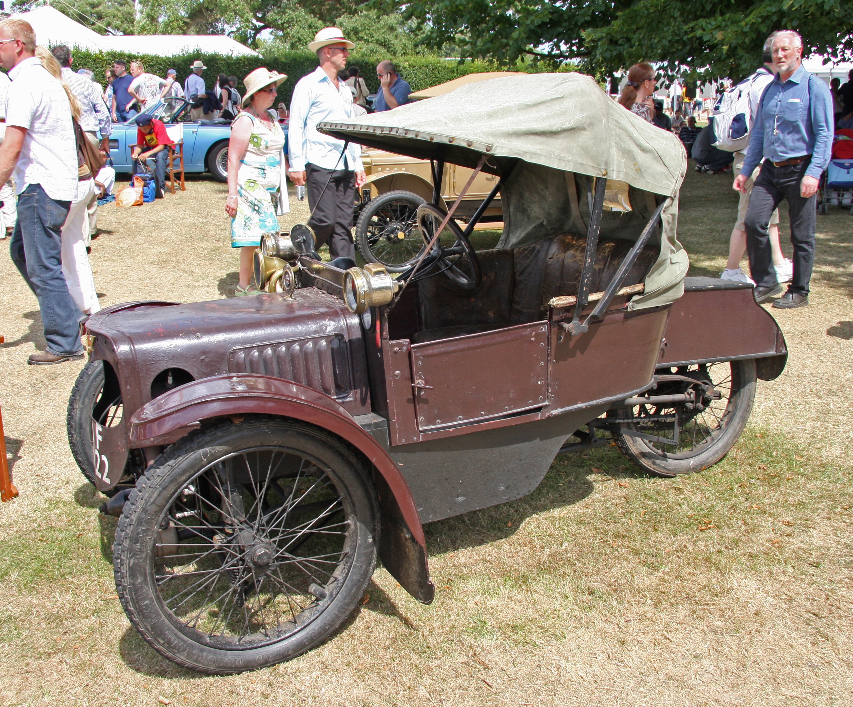 goodwood